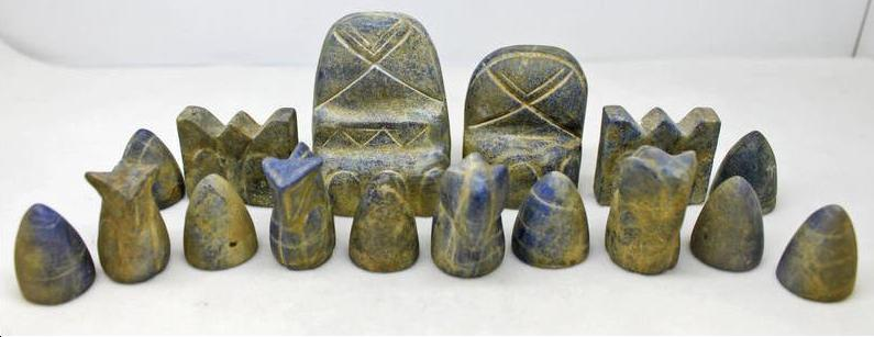 青色的波斯象棋棋子